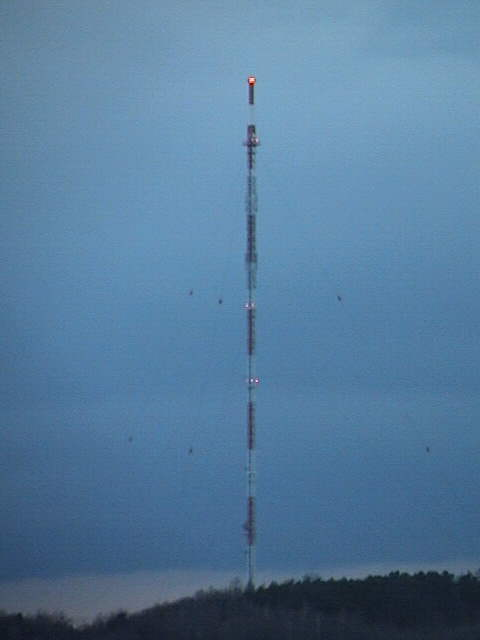 Sendemast bei Braunichswalde, 22. März 2004.